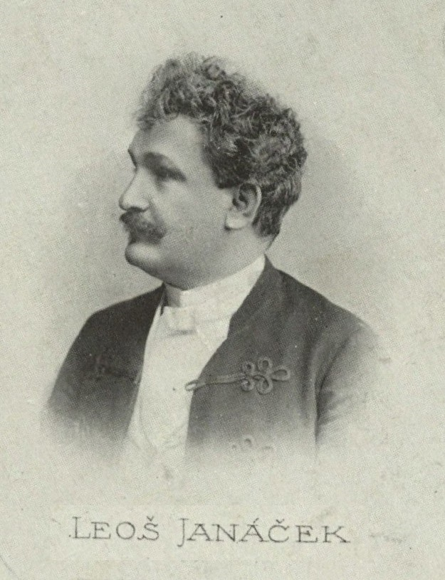 Portrét – Leoš Janáček (1854-1928), Český hudební skladatel.